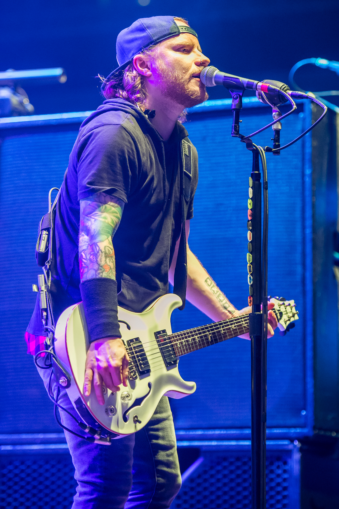 ARGO-Konzerte,Alternarena,Festival,Konzert,Livekonzert,Livemusik,Musik,RiP,Rock im Park 2016,Shinedown,Zach Myers